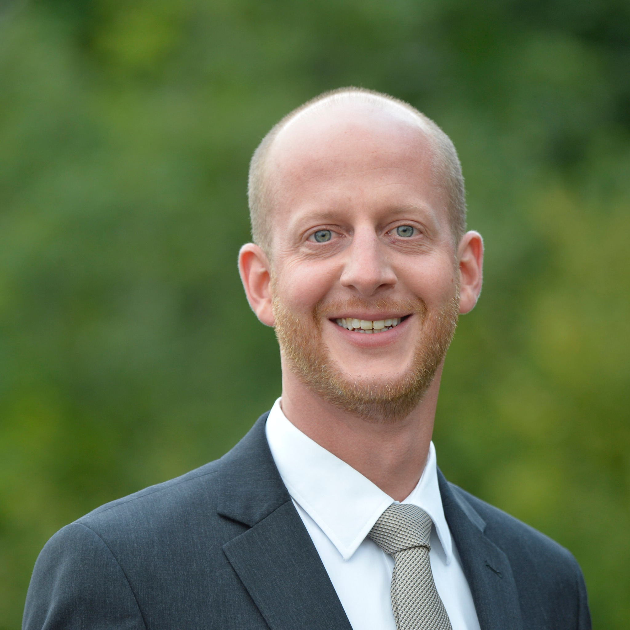 Porträt